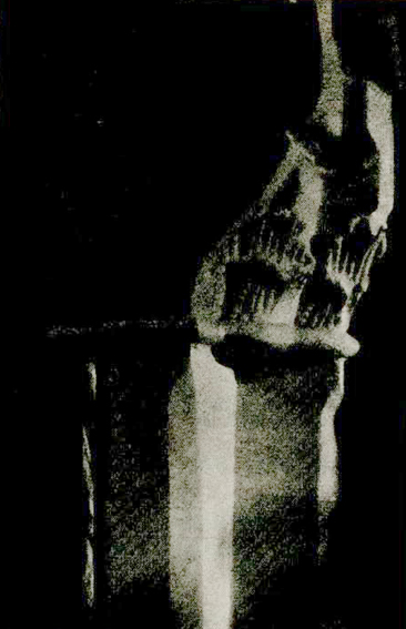 Романська капітель порталу церкви святого Василія Великого у Володимирі на Волині.